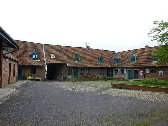 La Ferme du Héron aujourd'hui